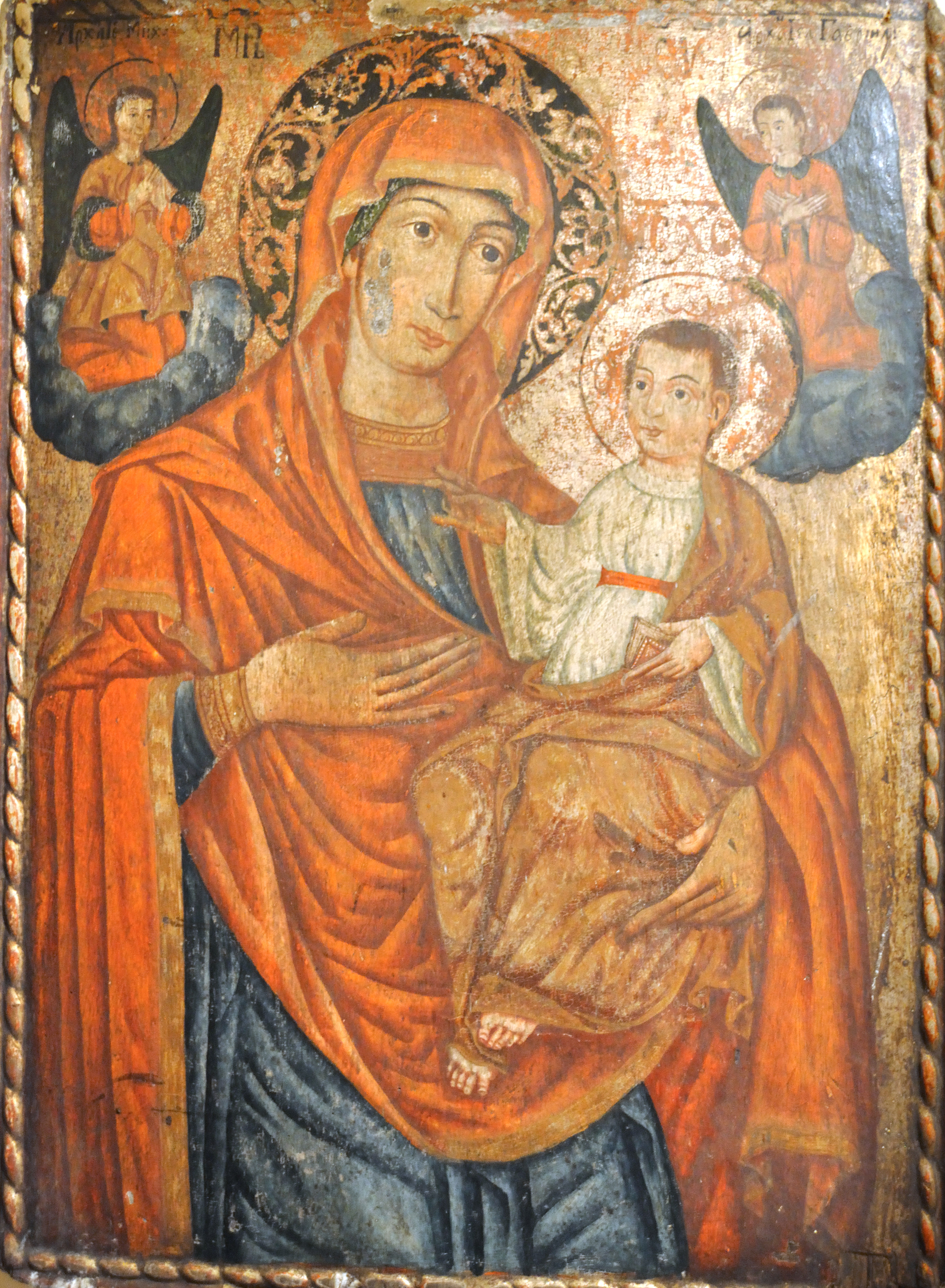 Biserica de lemn „Sfinții Arhangheli” din Păniceni, județul Cluj